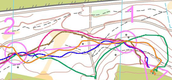 sprint-herrar